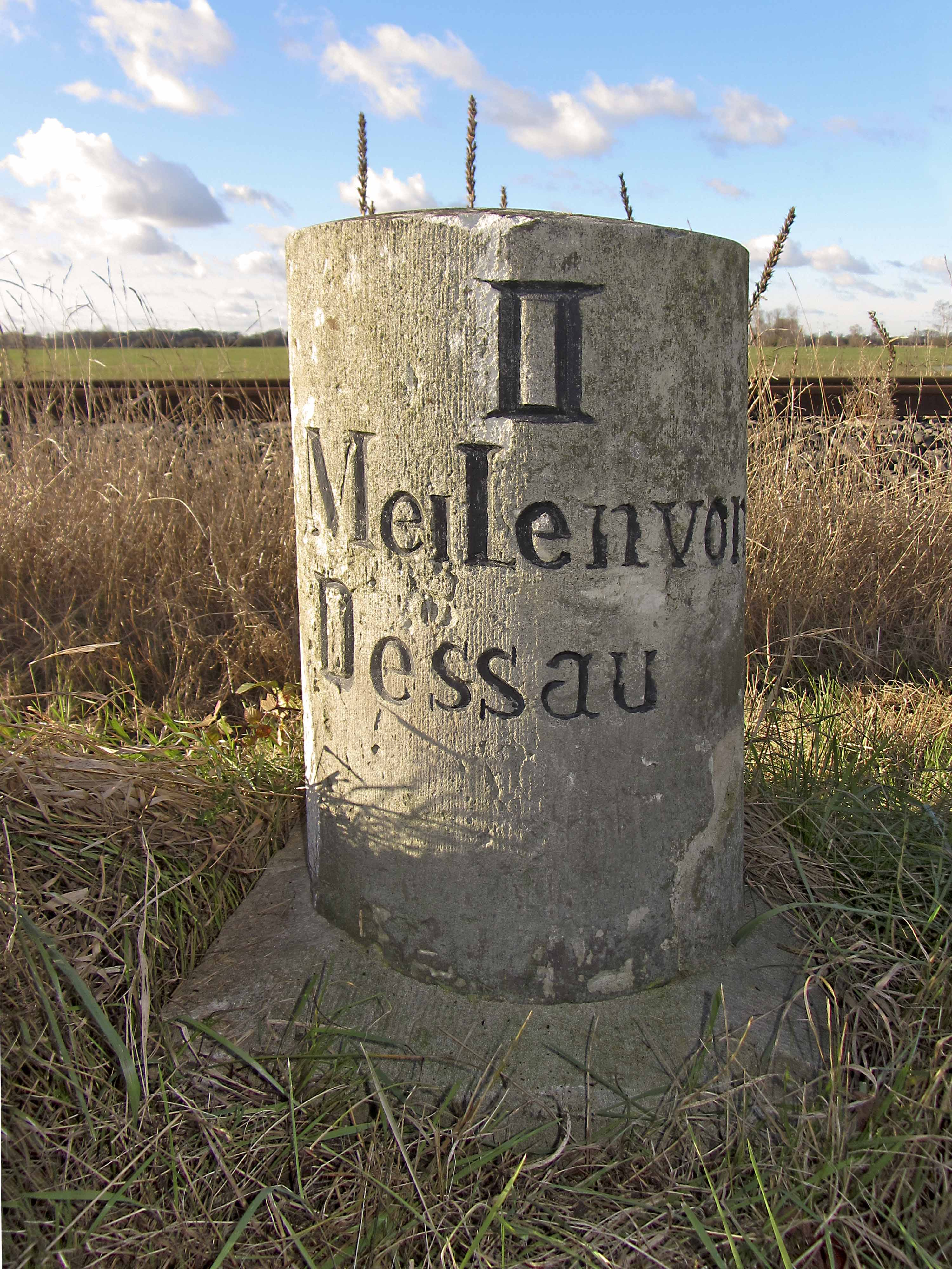 Anhaltischer Meilenstein an der L 133 zwischen Horstdorf und Wörlitz.